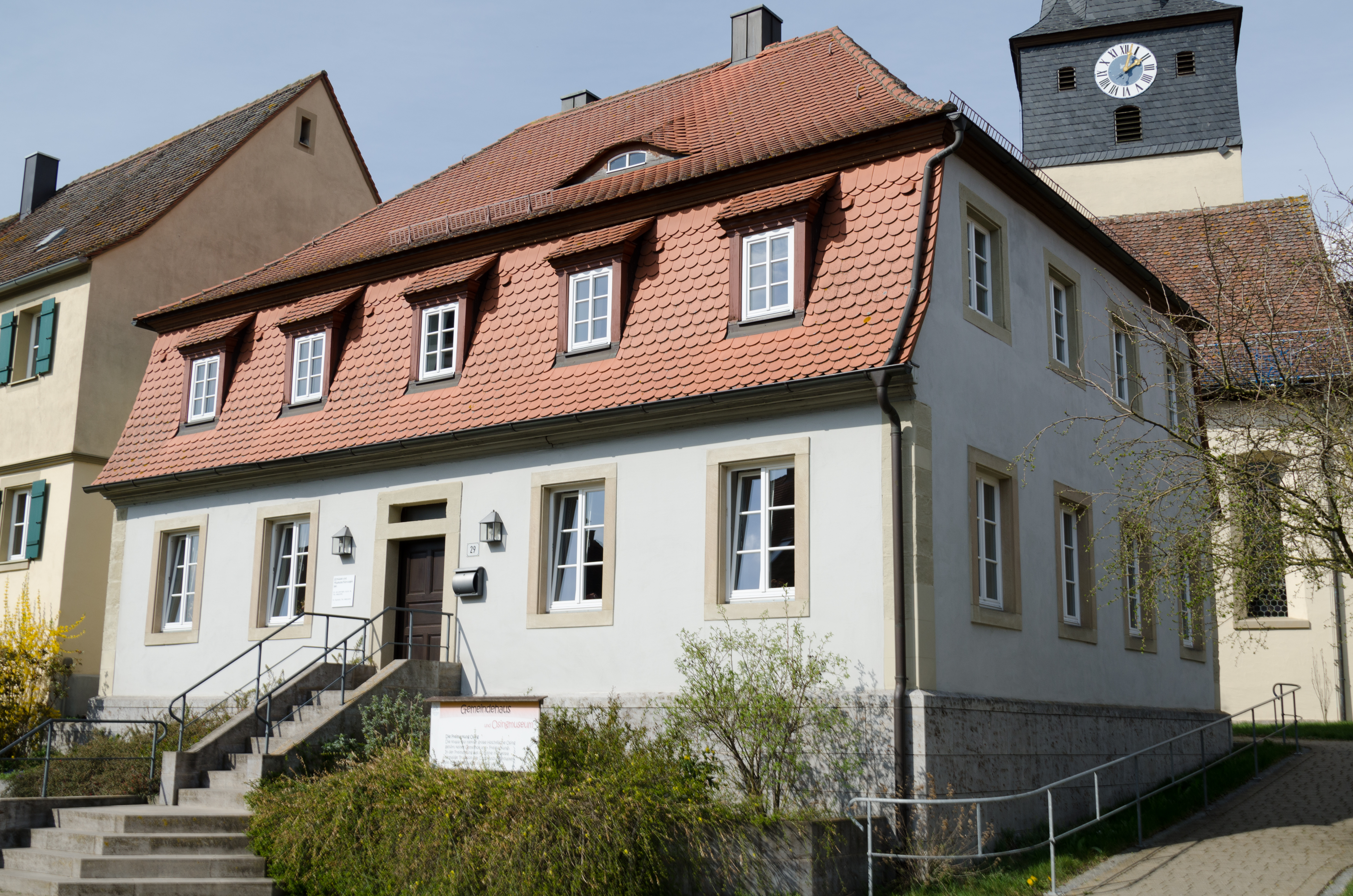 Markt Nordheim, Herbolzheim 29: Gemeindehaus und Osingmuseum